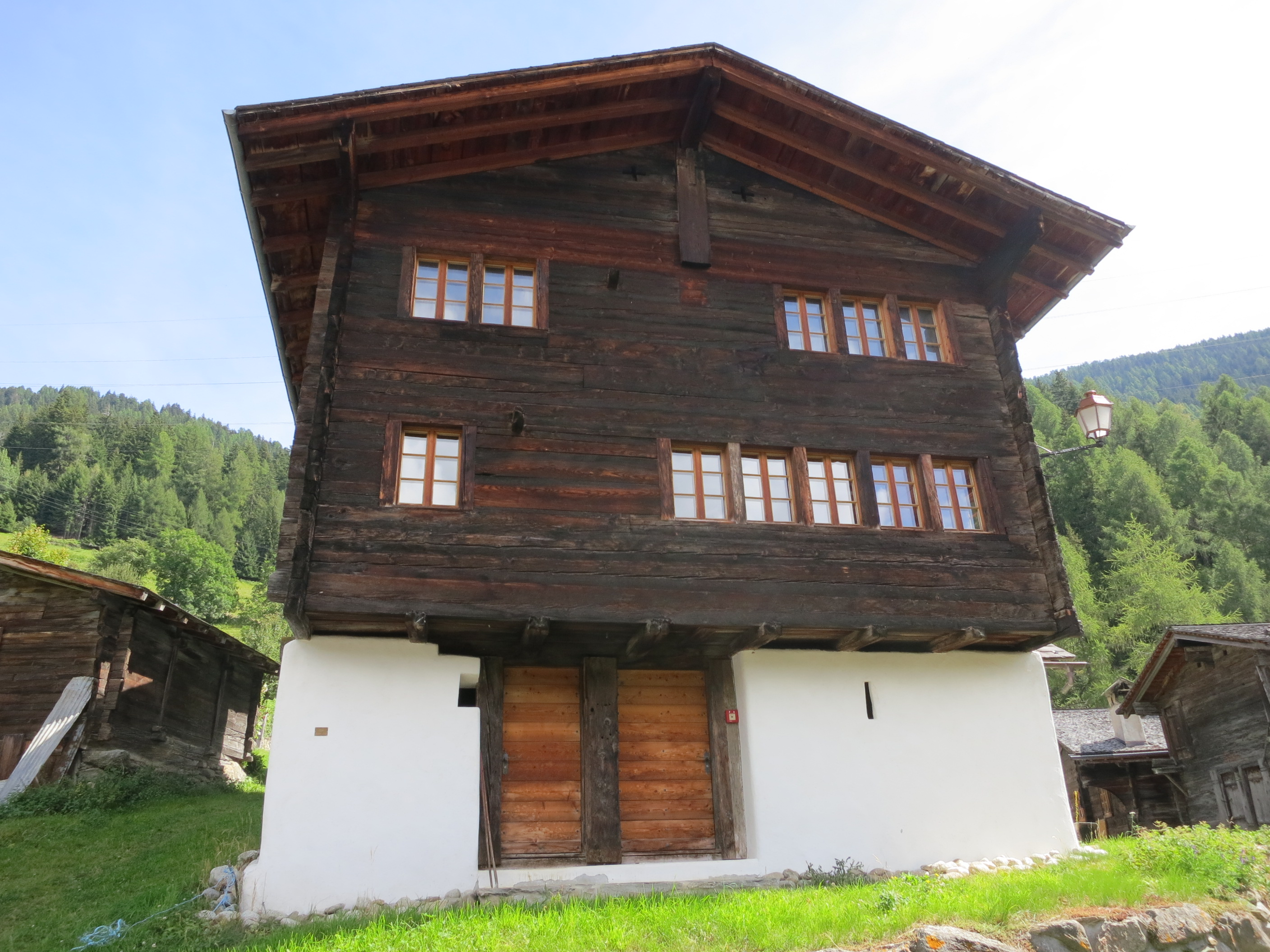 Wohnhaus, Mühlebach, Ernen VS, Schweiz